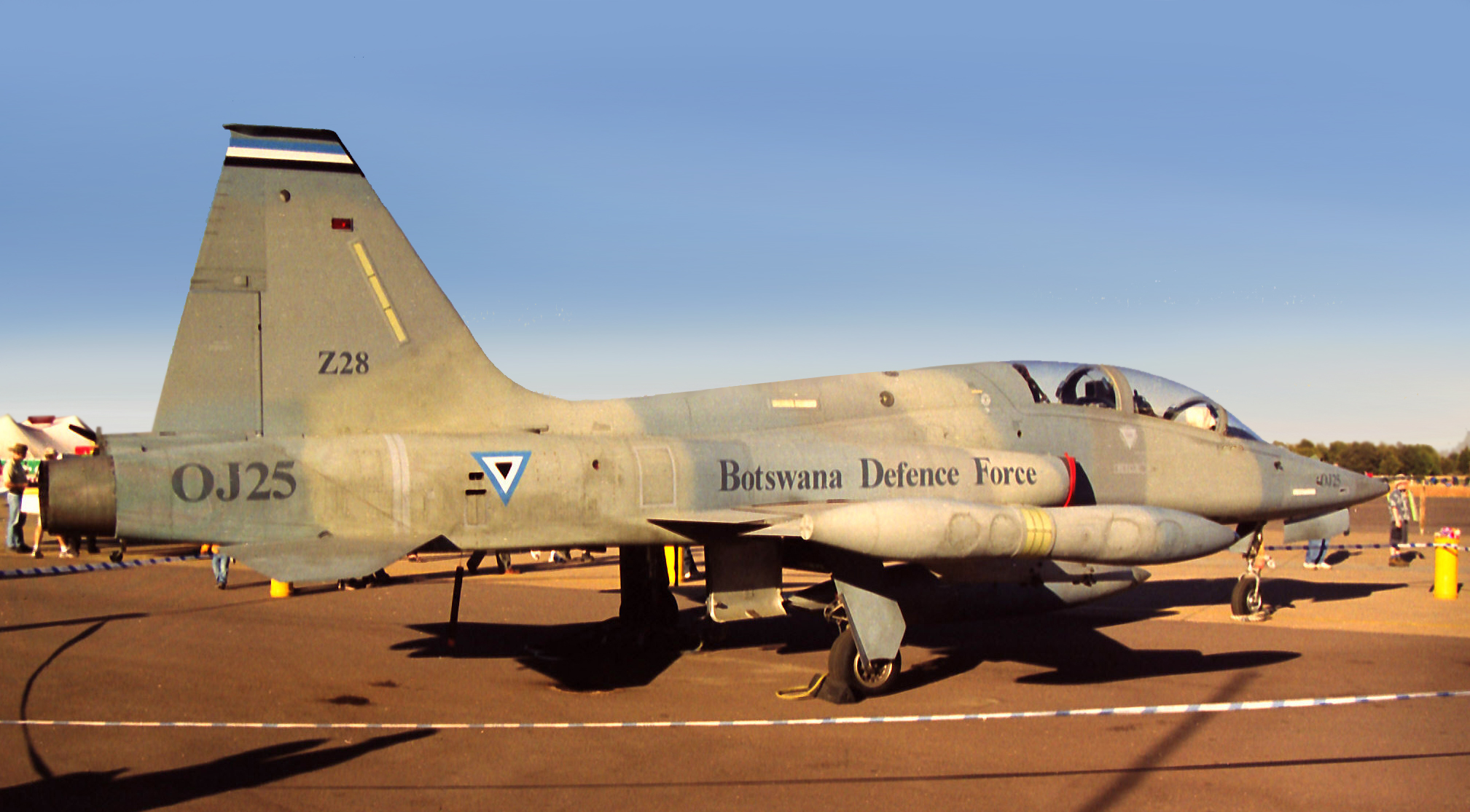 Botswana DF CF-5D OJ 25